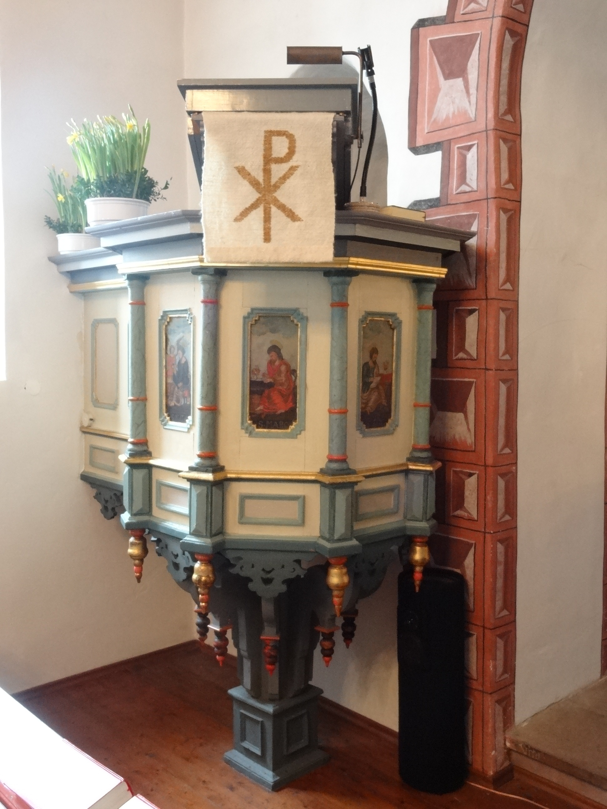 Evangelische Kirche Cleeberg